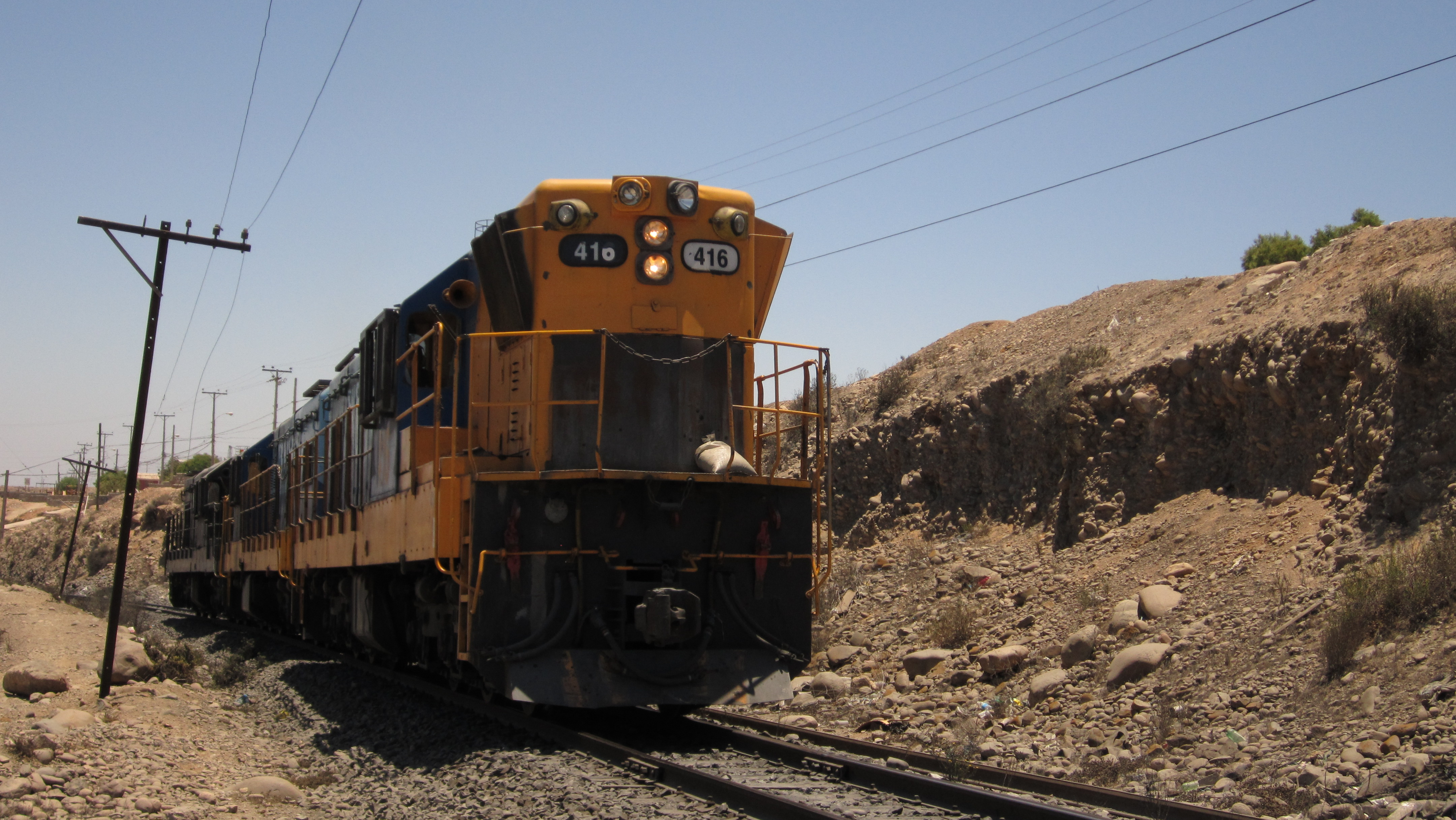 ... que hacen que siempre te lleves una sorpresa. Y hoy, fue una de ellas, nuevamente. Ya esperando que se reanude el servicio de carga por parte de FERRONOR, las locomotoras empiezan a ordenar lo inconcluso. En esta ocasión, esta tripleta de gr12 se dirige hacia la mina Los Colorados a buscar las tolvas cargadas.